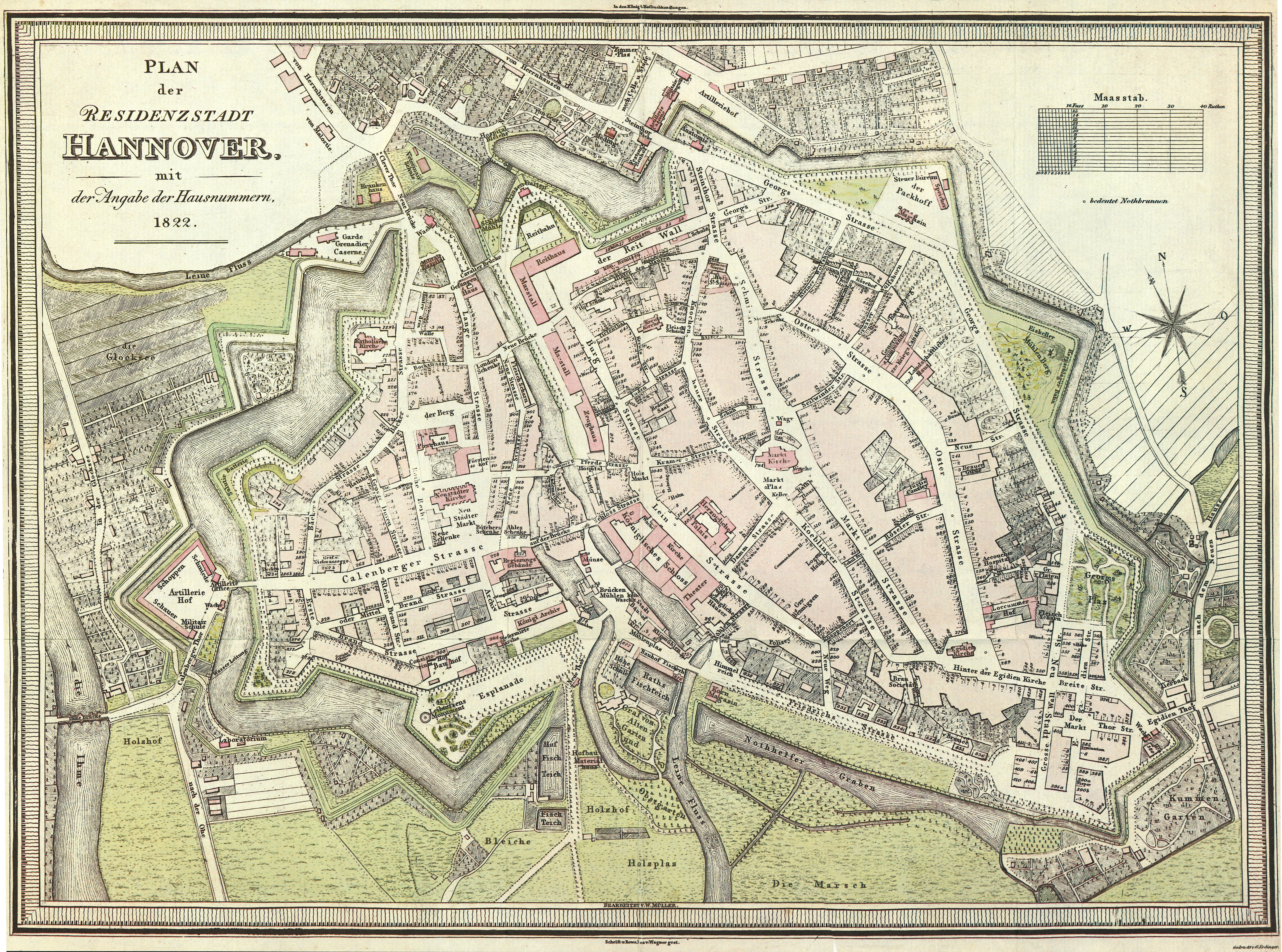 Der von dem Ingenieurmajor Georg Wilhelm Müller bearbeitete, von dem Kupferstecher Wagner gestochene und von dem Kupferstichdrucker Johann Georg Erdinger gedruckte „Plan der Residenzstadt Hannover, mit Angabe der Hausnummern, 1822“ hier in einer Auflösung von etwa 400 dpi ...